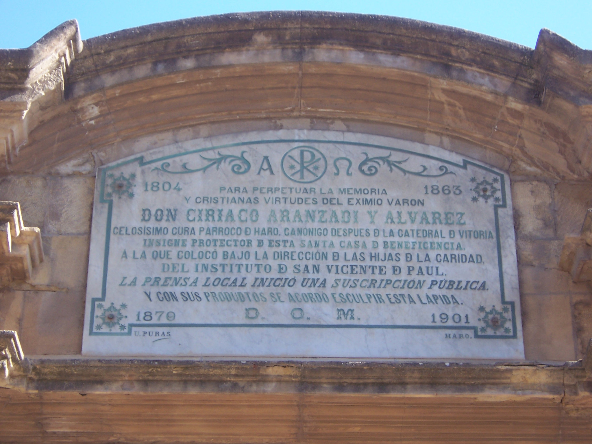 Placa en memoria de Ciriaco Aranzadi. Párroco de Haro y Canónigo de la Catedral de Vitoria